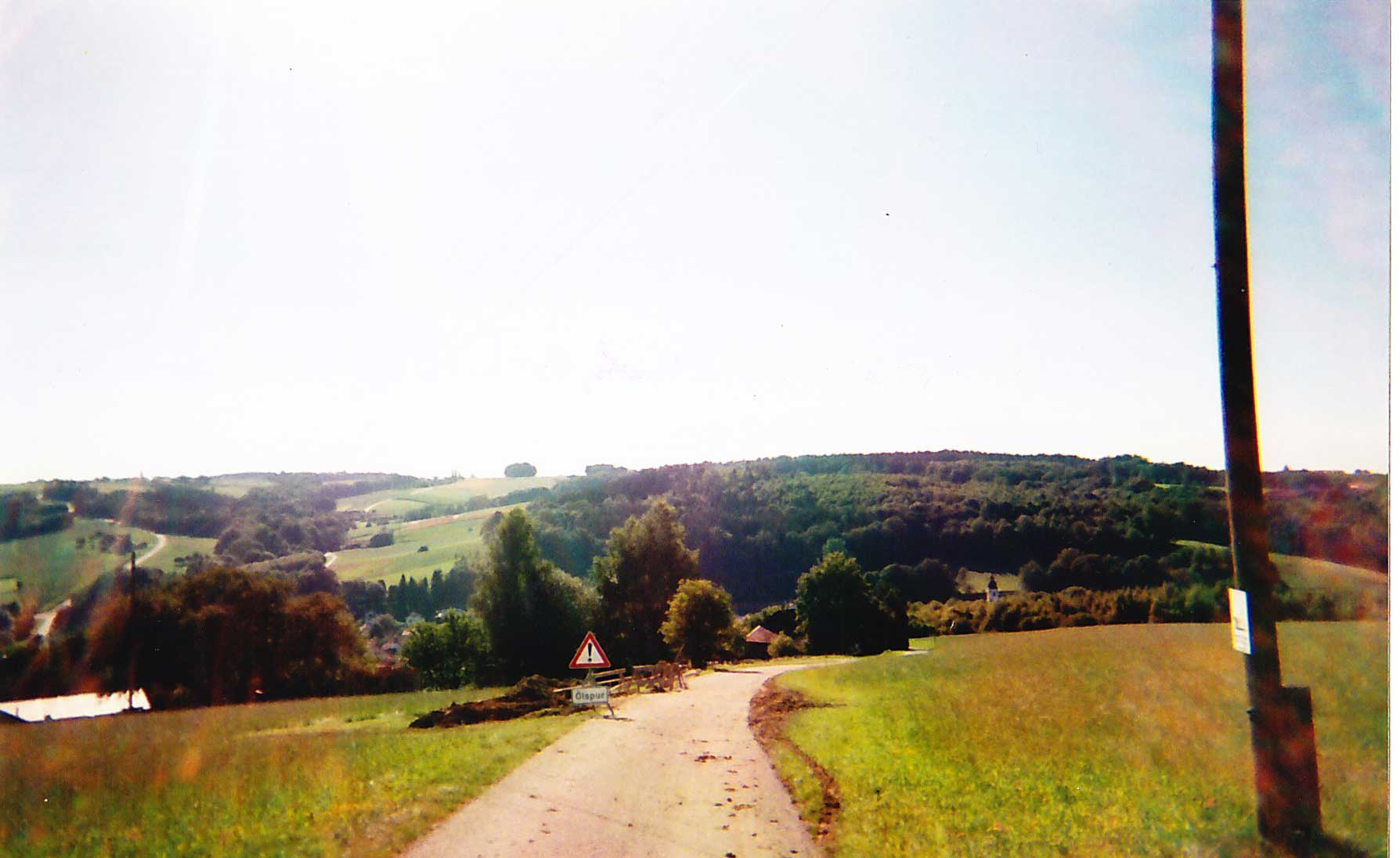 Die südöstlichen Ausläufer der Gatterberge bei Oberornau